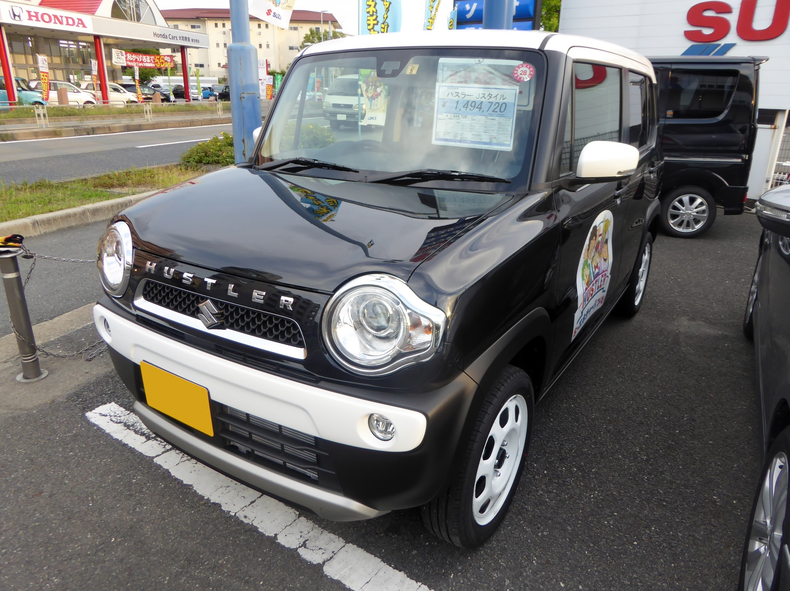 DAA-MR41S型スズキ・ハスラーJスタイルをフロントから撮影。